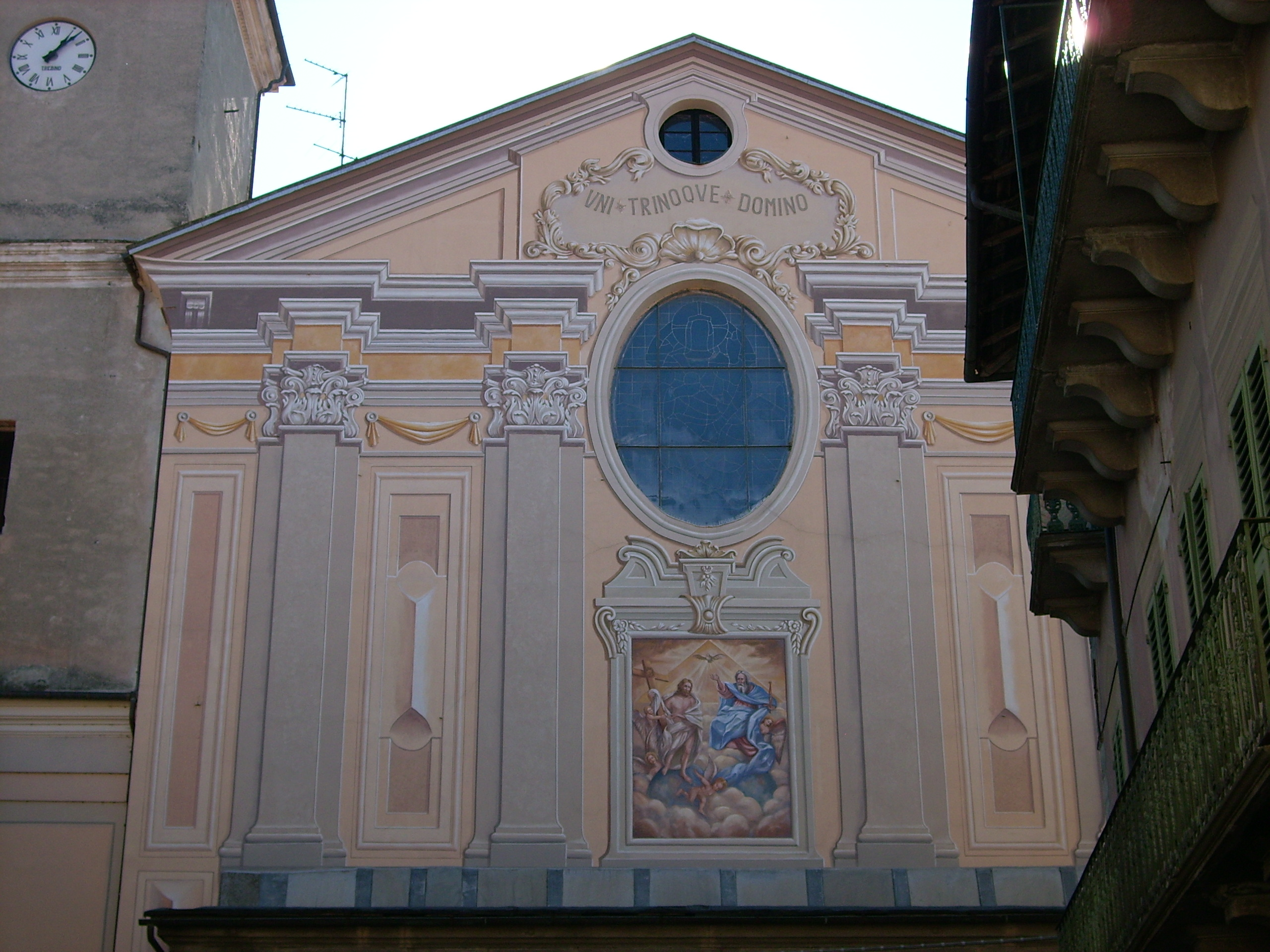 Chiesa della Santissima Trinità presso Sassello, Liguria, Italia